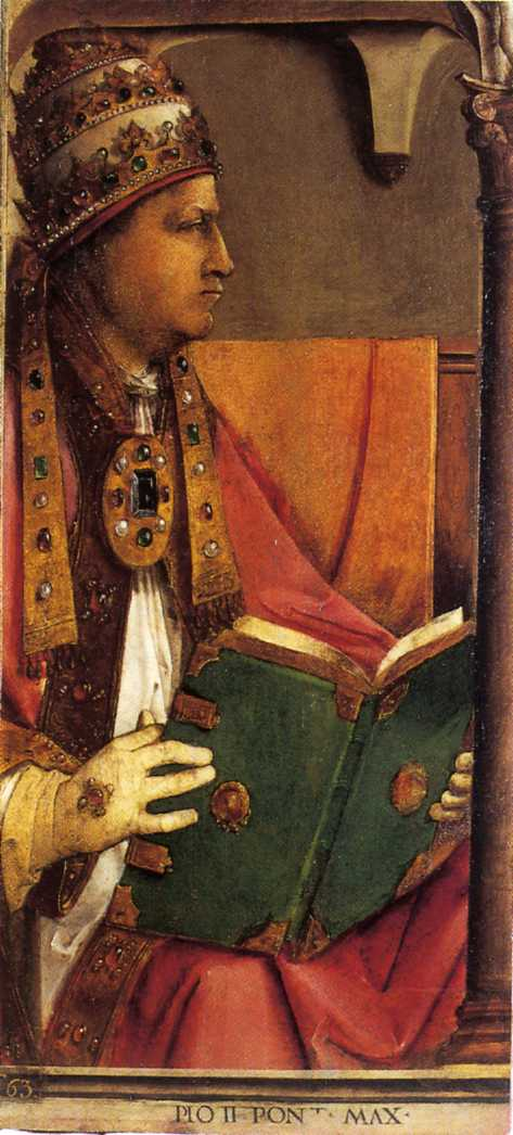 Pio II Pont Max (papa Pio II) - Studiolo di Federico da Montefeltro